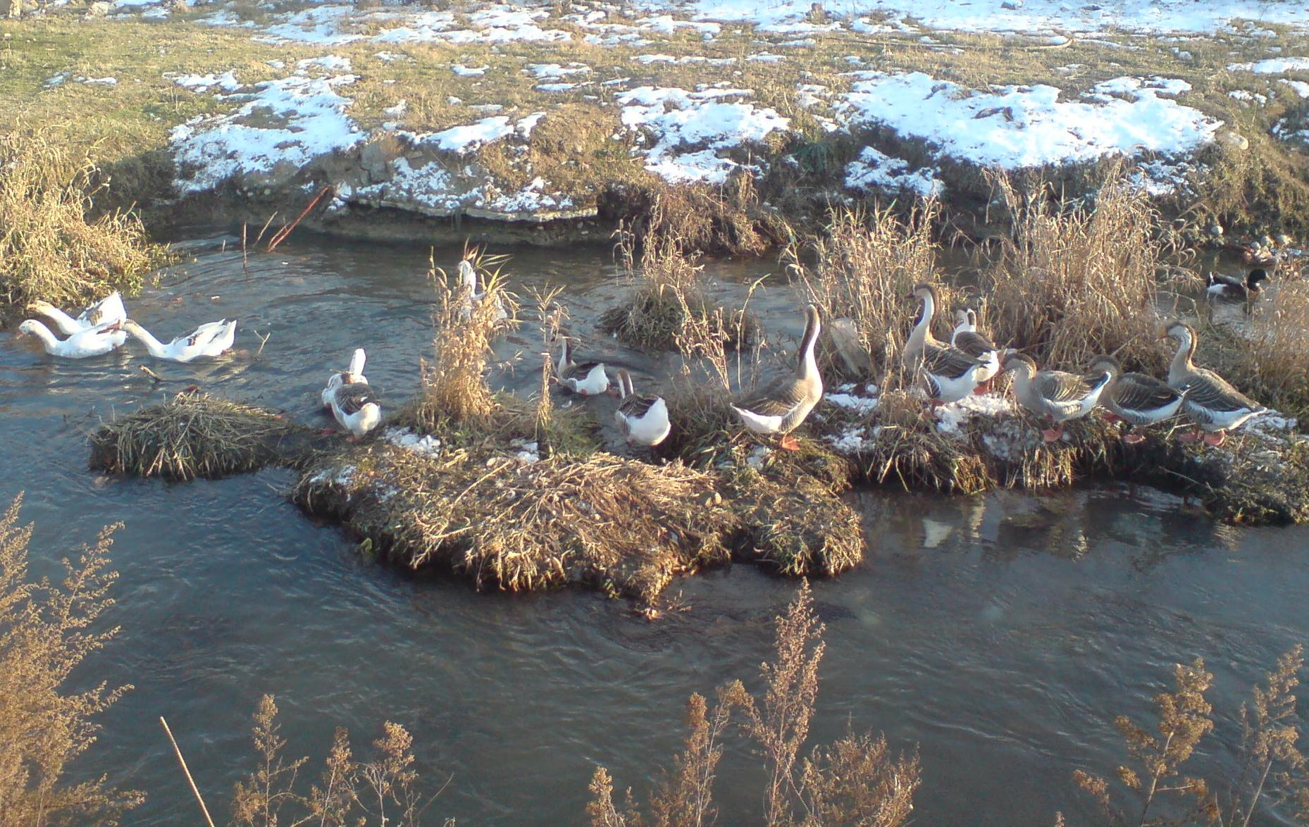 Домашние гуси-сухоносы (Anser cygnoides) на канале Салар, город Ташкент, между Ботаническим садом и железной дорогой Ташкент-Москва